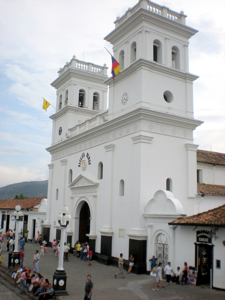 Basilica Menor San Juan Bautista de Giron, Santander (Dep.), Colombia